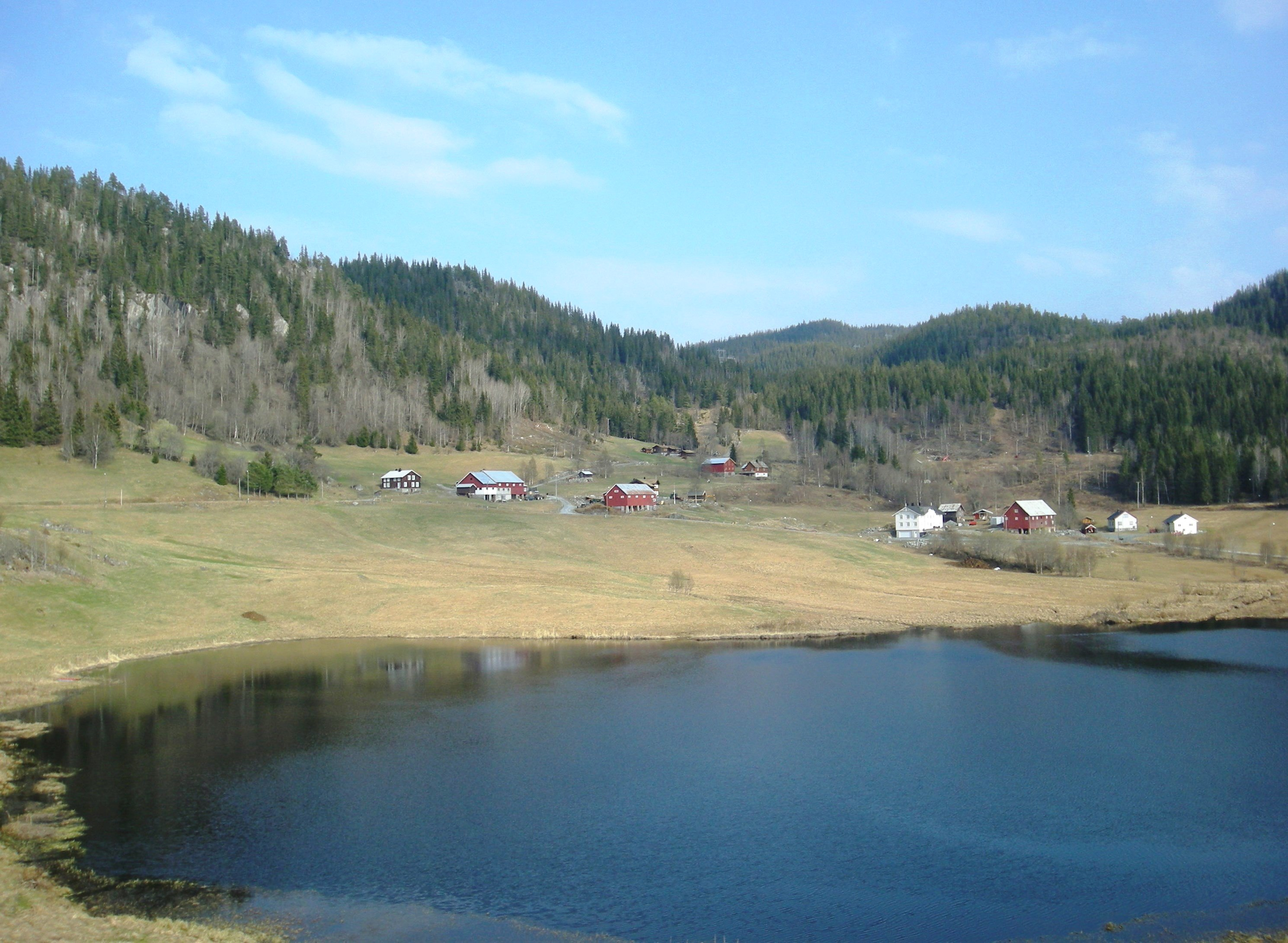 Eidsborgtjønn sett fra stavkirketomten, med Lofthus-gårdene i bakgrunnen